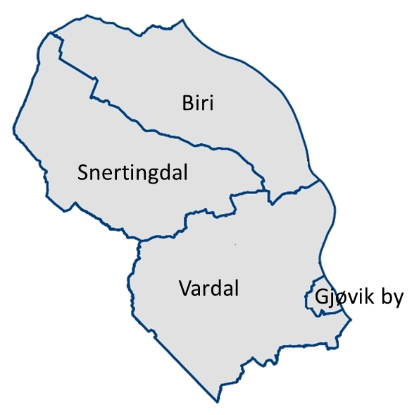 Kart over herredene Biri, Snertingdal, Vardal og byen Gjøvik som i 1964 ble slått sammen til Gjøvik kommune.